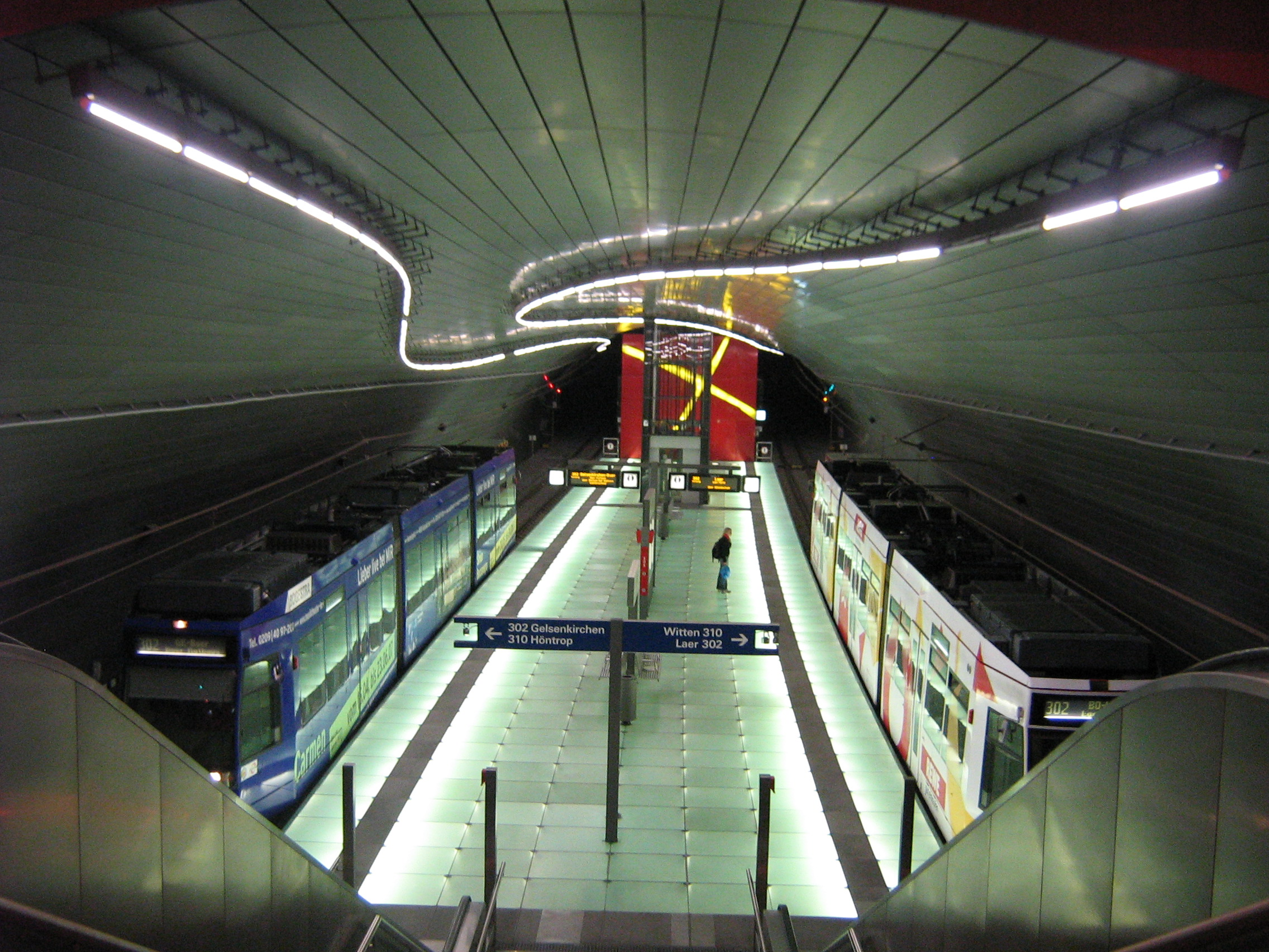 Zwei NF6D der Bogestra begegnen sich in der Station Lohring.